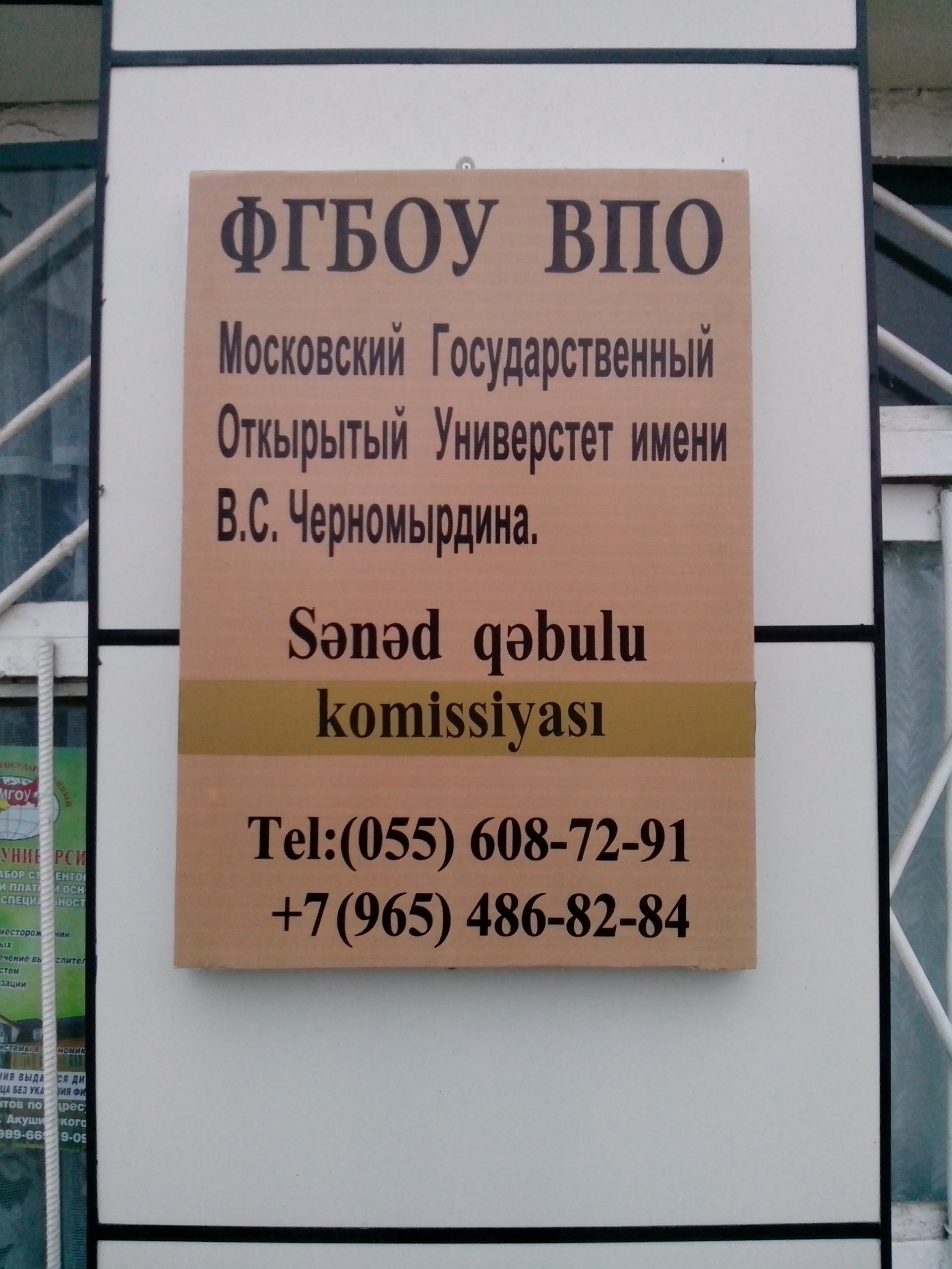 Xaçmazda FQBOU VPO